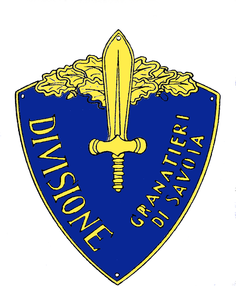 scudetto divisione granatieri di savoia